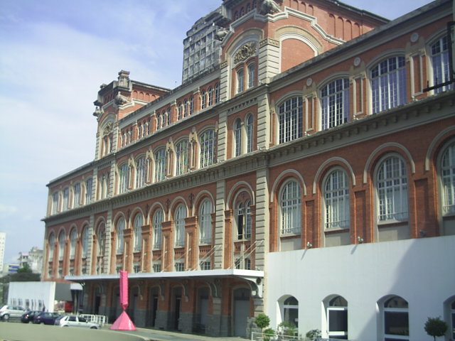 Estação Pinacoteca, Bom Retiro, São Paulo, SP, Brasil.